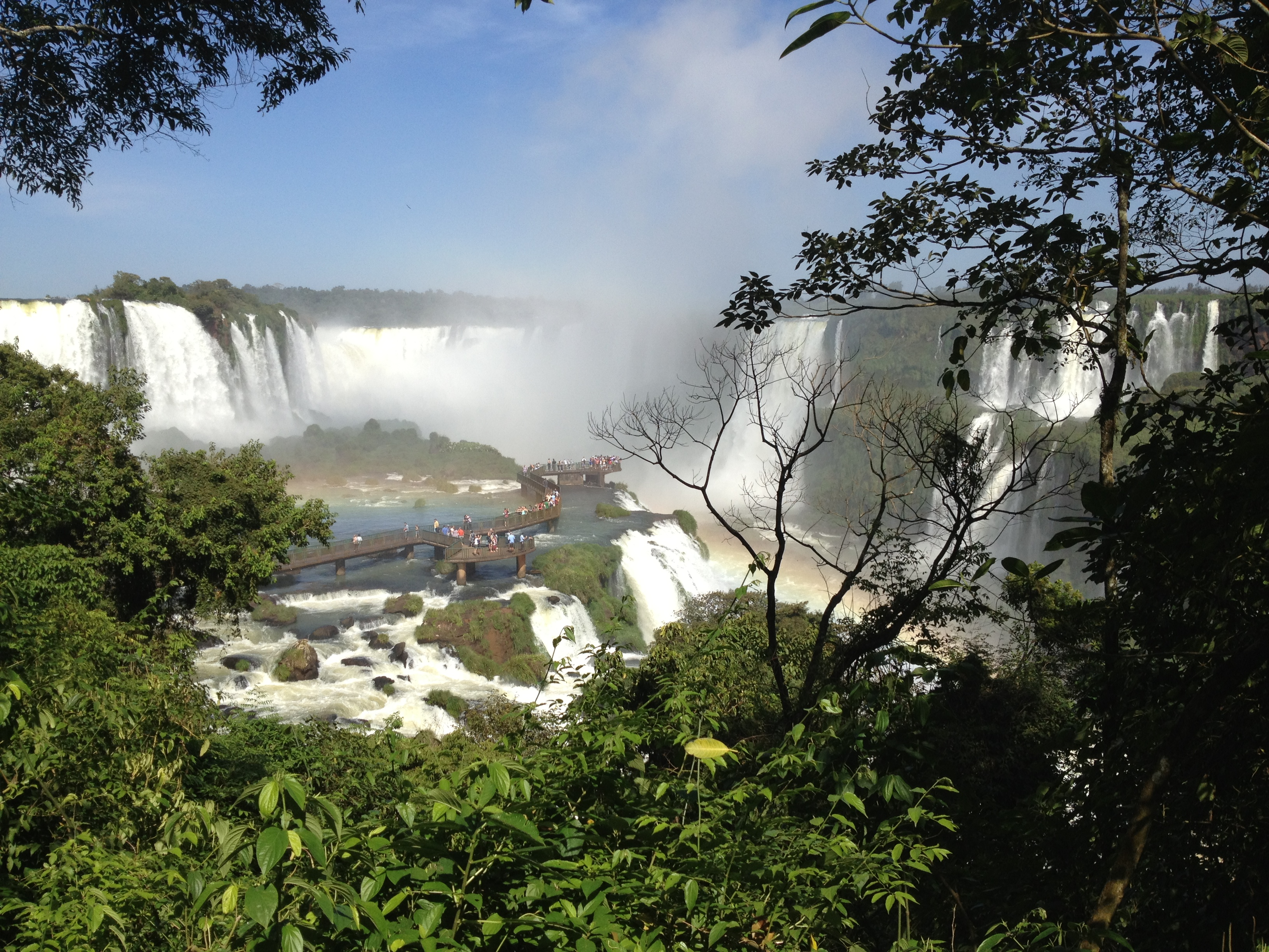 Cataratas do Iguaçu, brazilian side